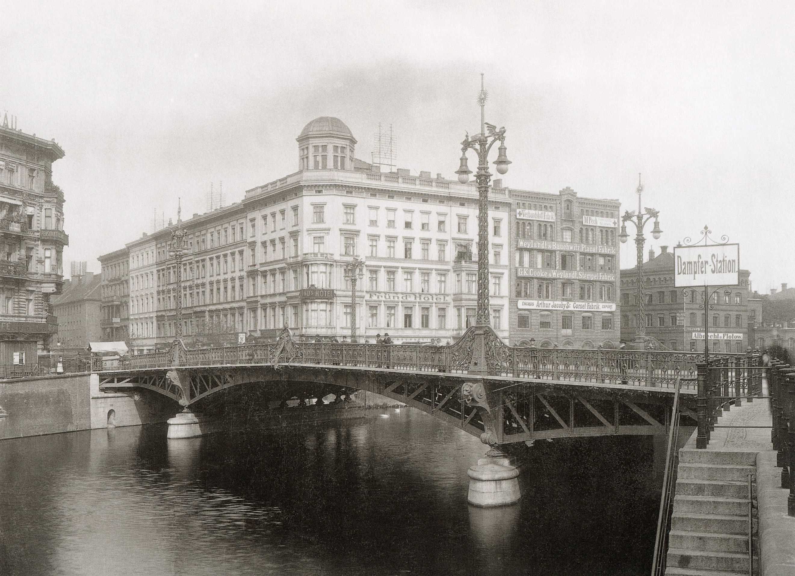 Weidendammer Brücke in Berlin